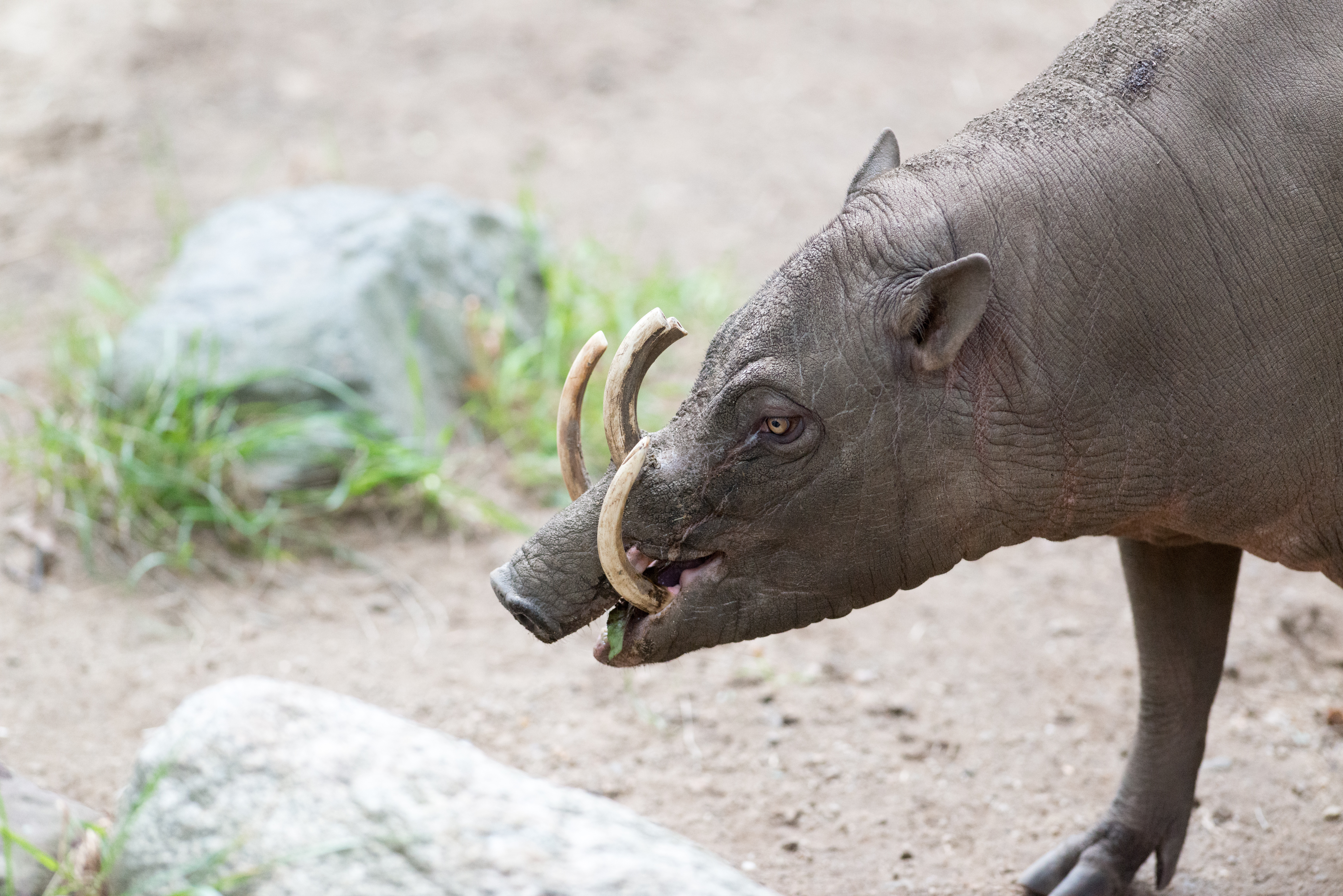 Babirusa Profile